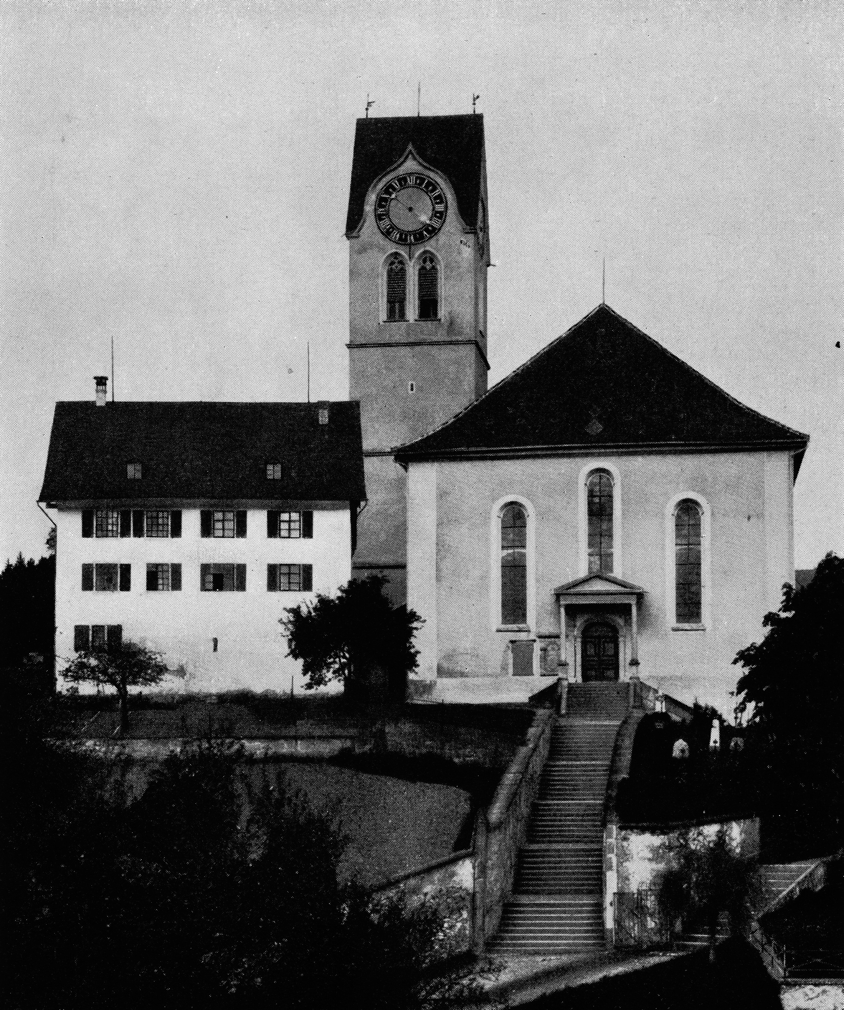 Reformirte Kirch mit altem Pfarrhauße zů Hinwil im Zürichbiet, von Weſten geſehn.